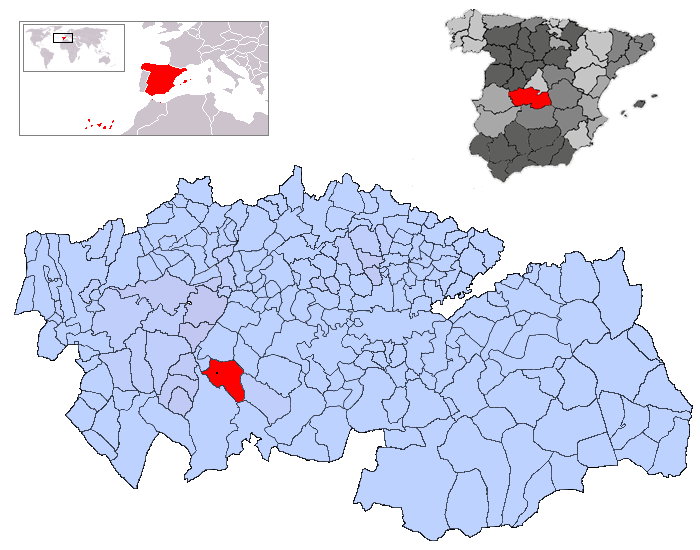 Los Navalmorales en la provincia de Toledo